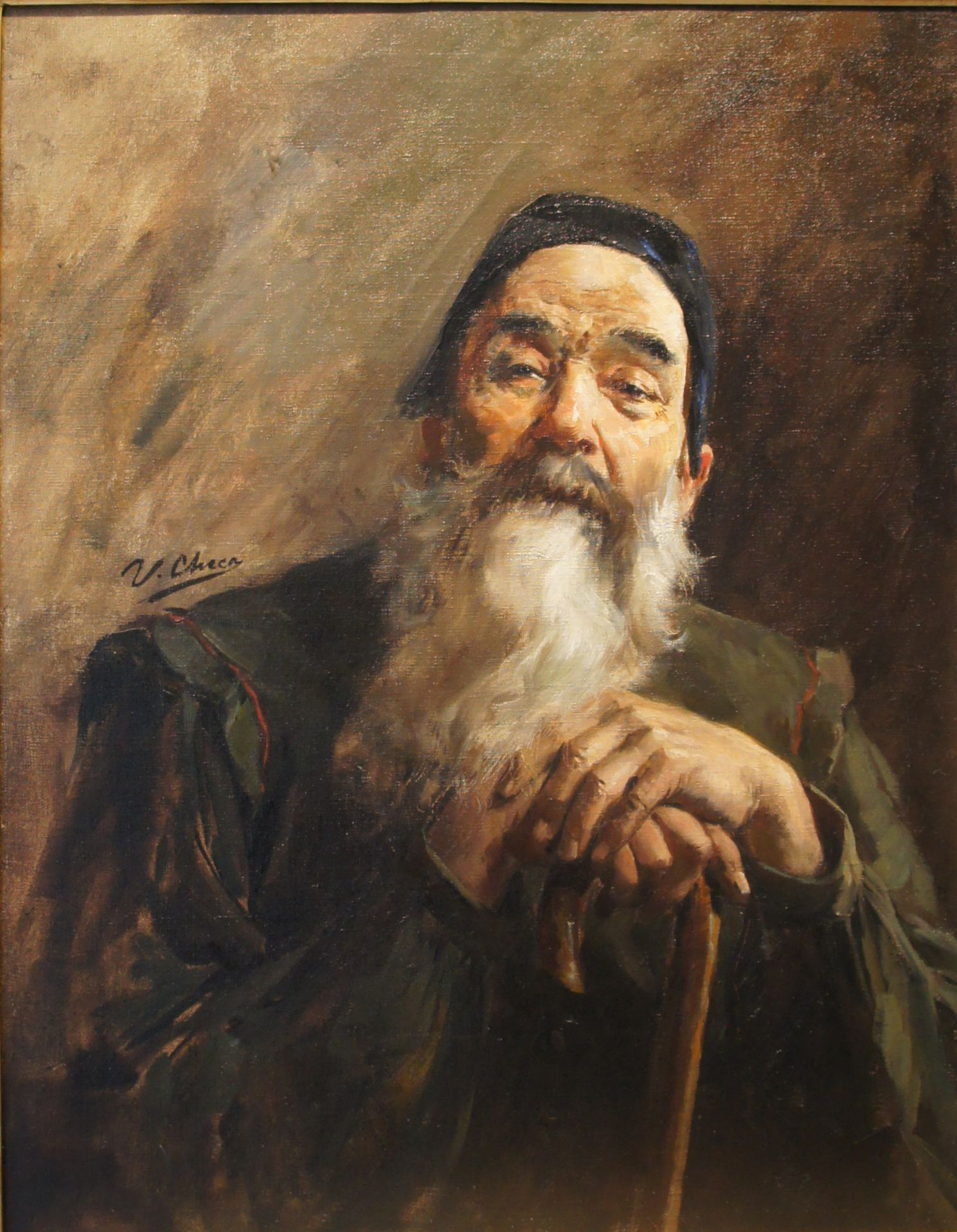 Anciano, óleo sobre lienzo, 76,6 x 58 cm. firmado lateral izquierdo.